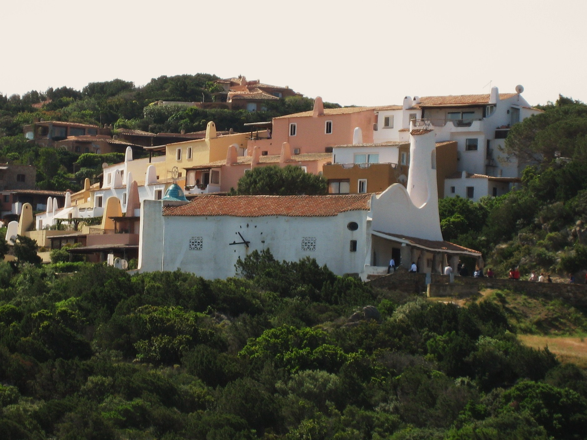 Église Stella Maris de Porto Cervo. Importation de photo libre de droit